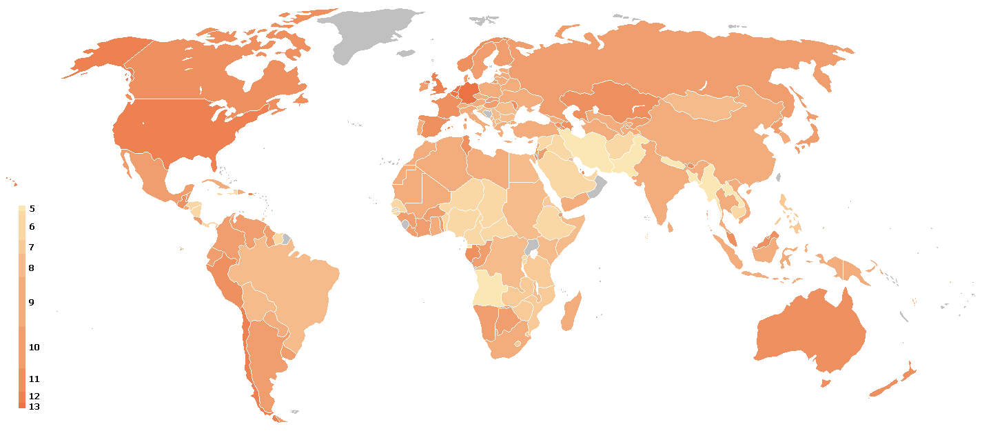 Mapa de los años de educación obligatoria, en el mundo.